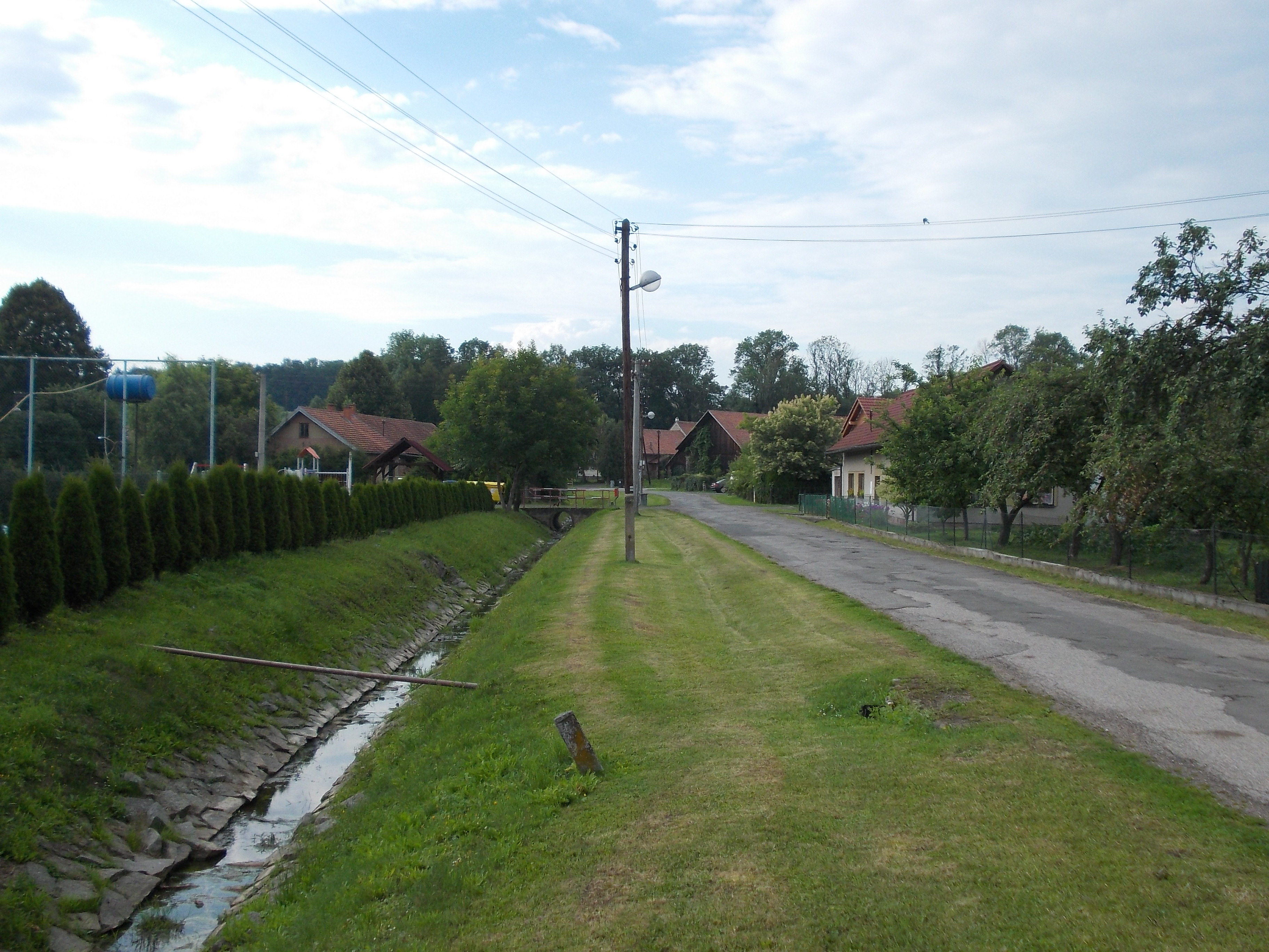 Dílce - střed obce (pohled SSZ směrem)